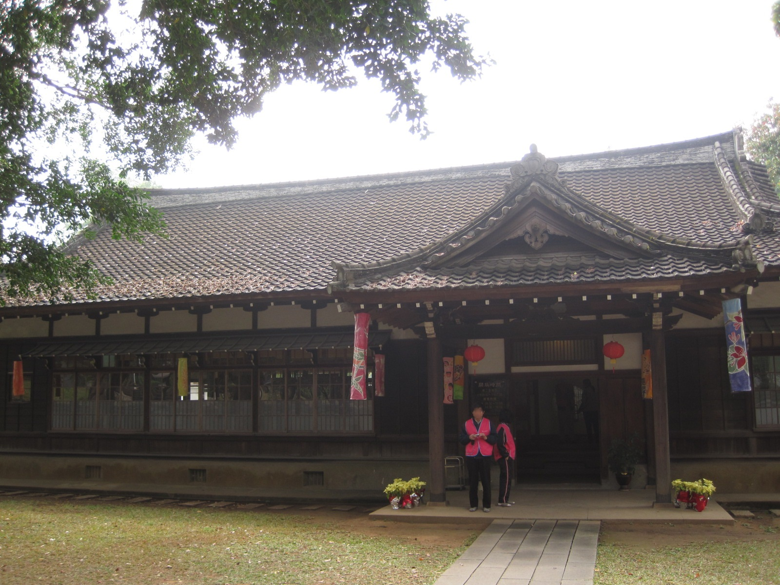 中文（台灣）: 嘉義神社齋館。